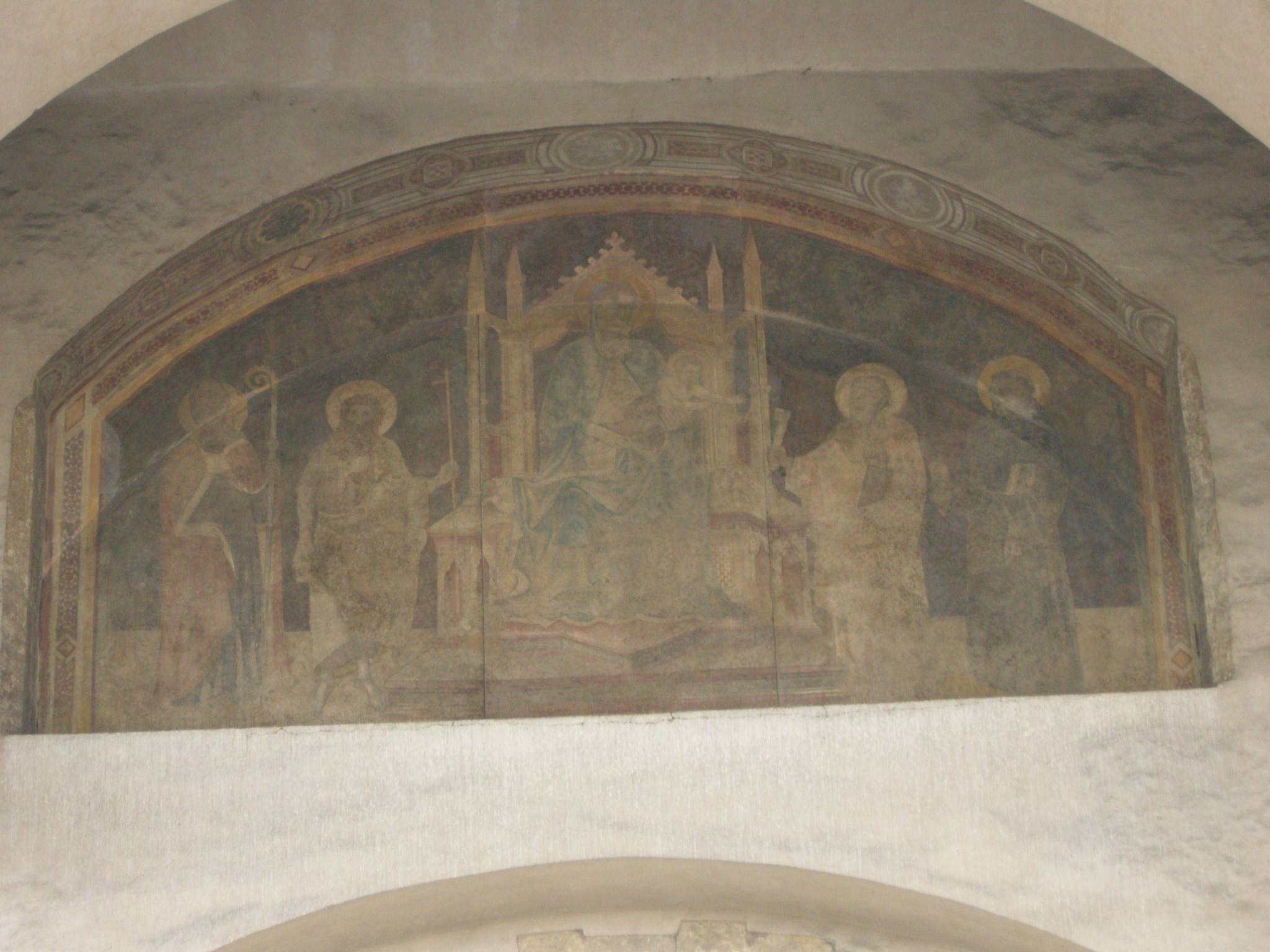 Porta romana, firenze, affresco